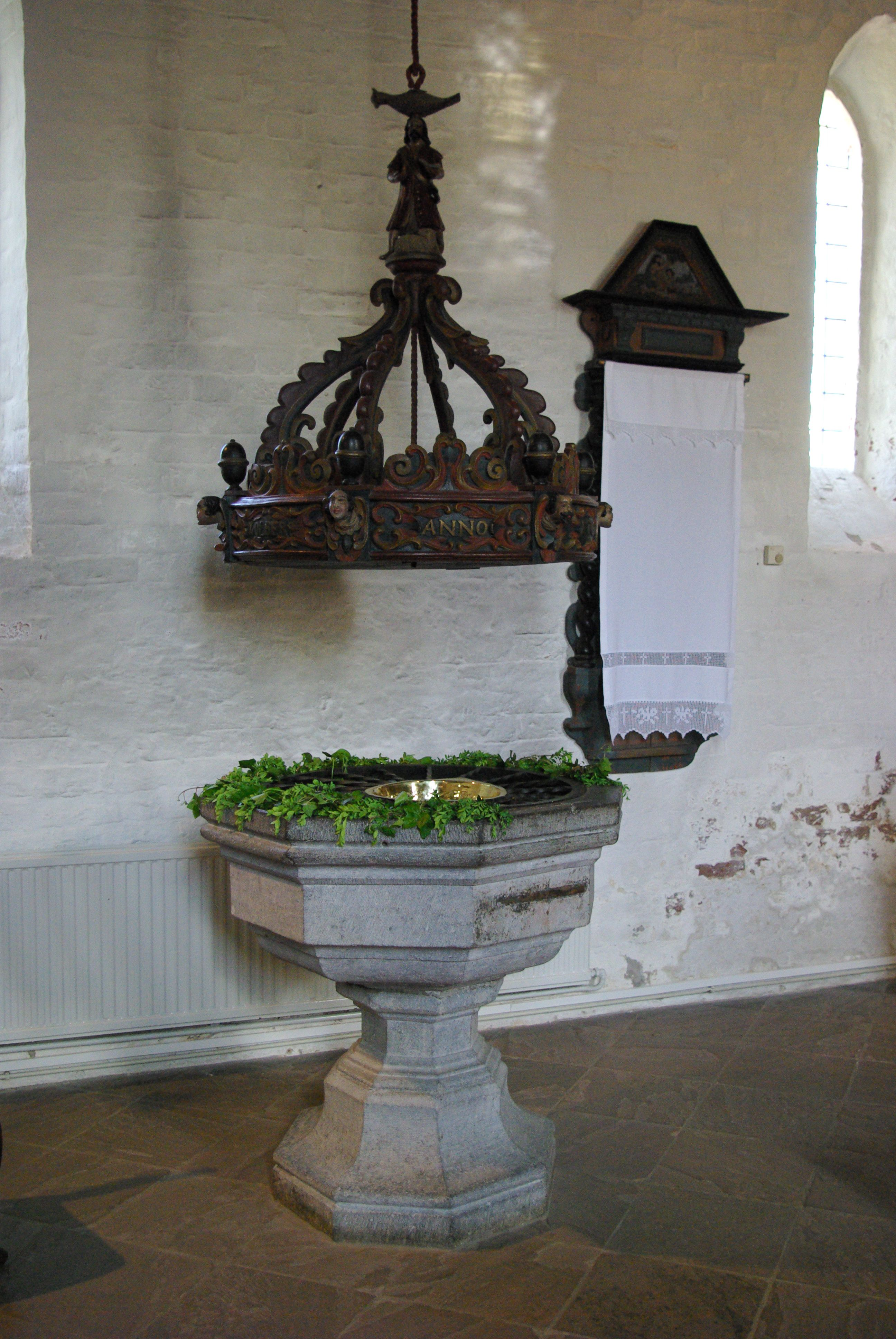 Husum, Stadtteil Schobüll, Kirche "Kirchlein am Meer", das Taufbecken im Altarraum (Geotag in den Exif-Daten)